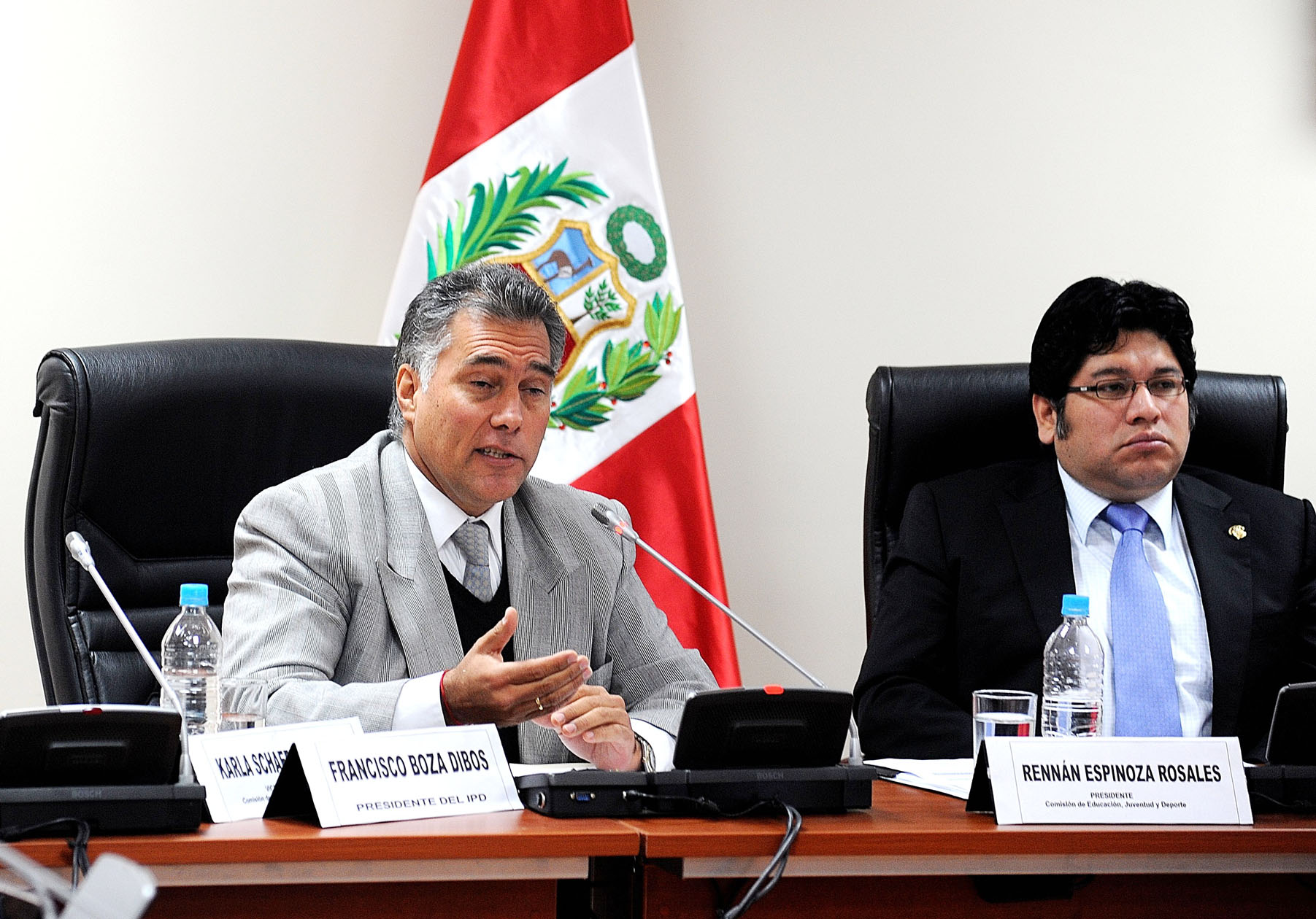 El nuevo jefe del Instituto Peruano del Deporte (IPD), Francisco Boza Dibós, informa sobre la política institucional que llevará adelante en ese organismo. Fue en sesión de la Comisión de Educación, presidida por el congresista Renán Espinoza Rosales.